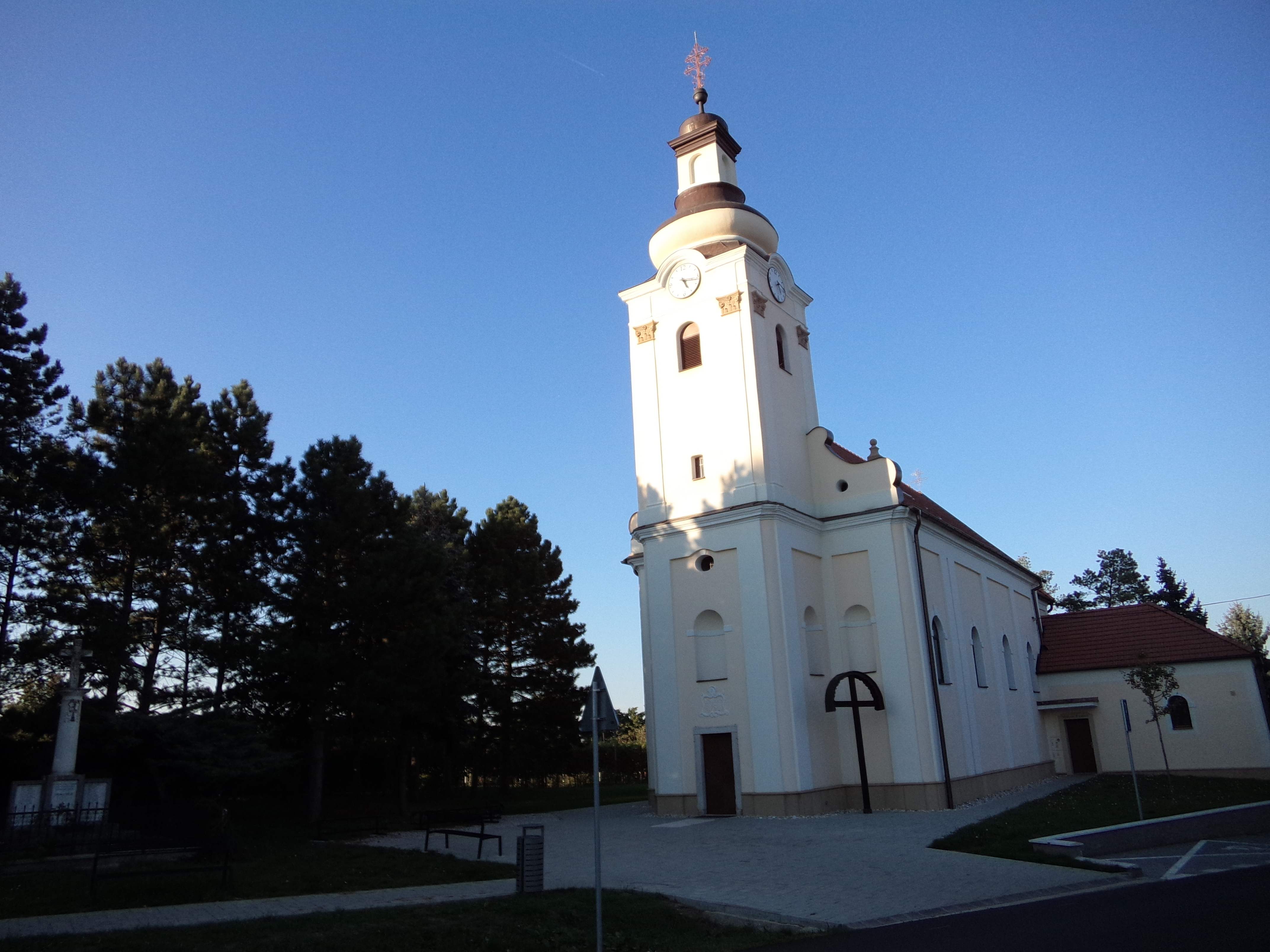 Pusztafödémes